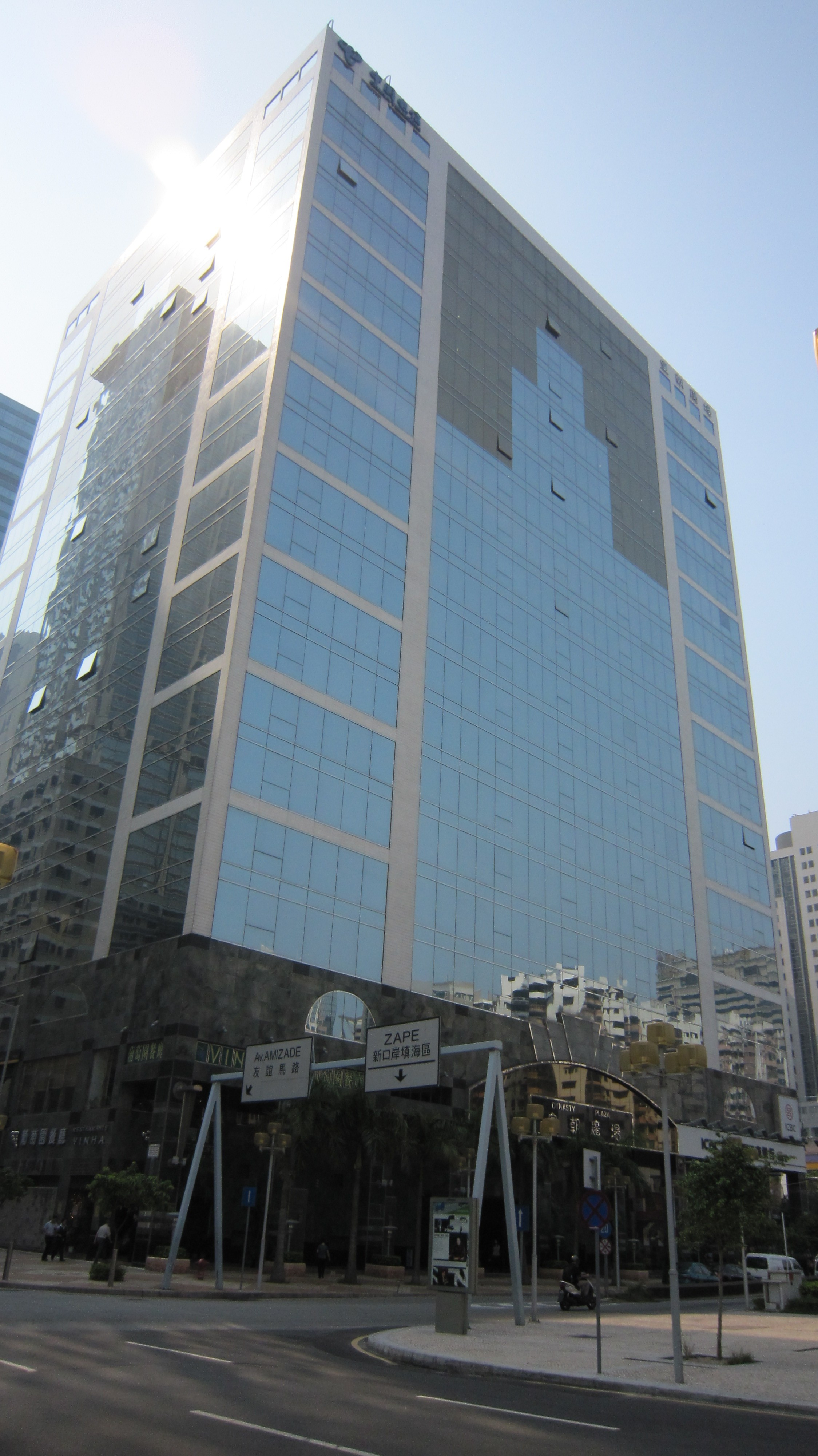 Dynasty Plaza